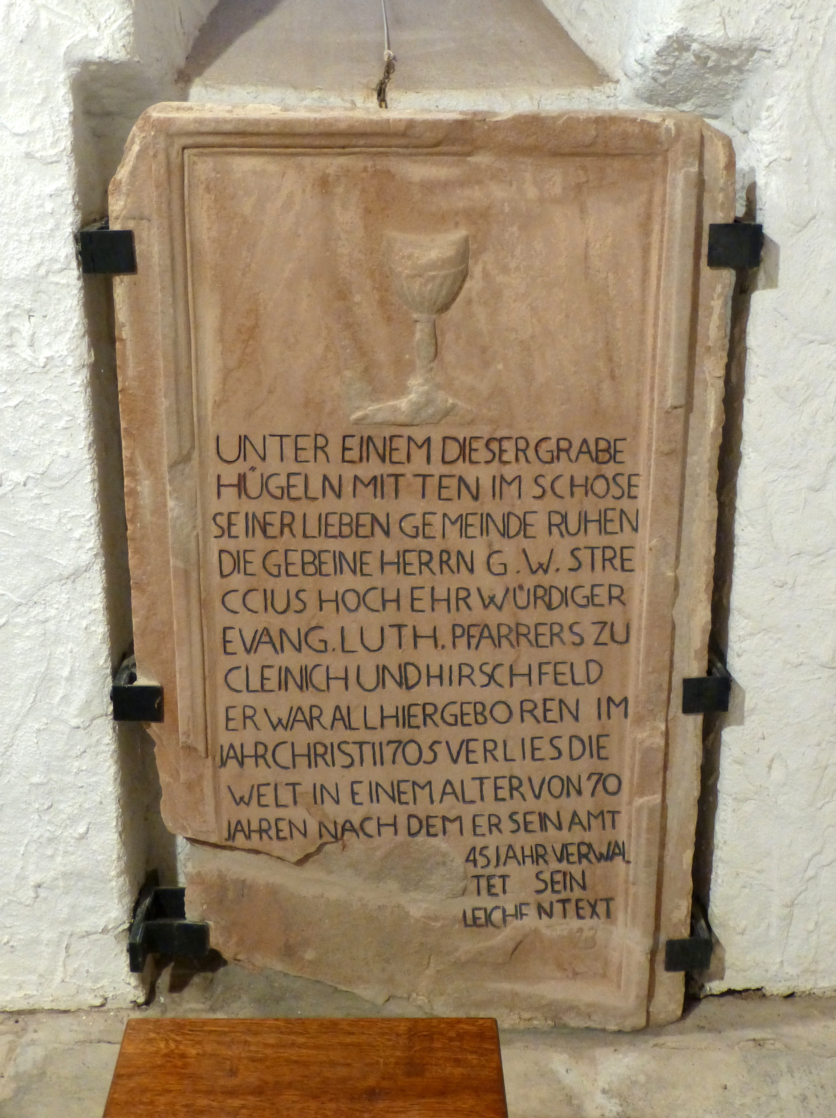 Grabtafel von Georg Wilhelm Streccius (1705–1774) in der Evangelischen Pfarrkirche in Kleinich